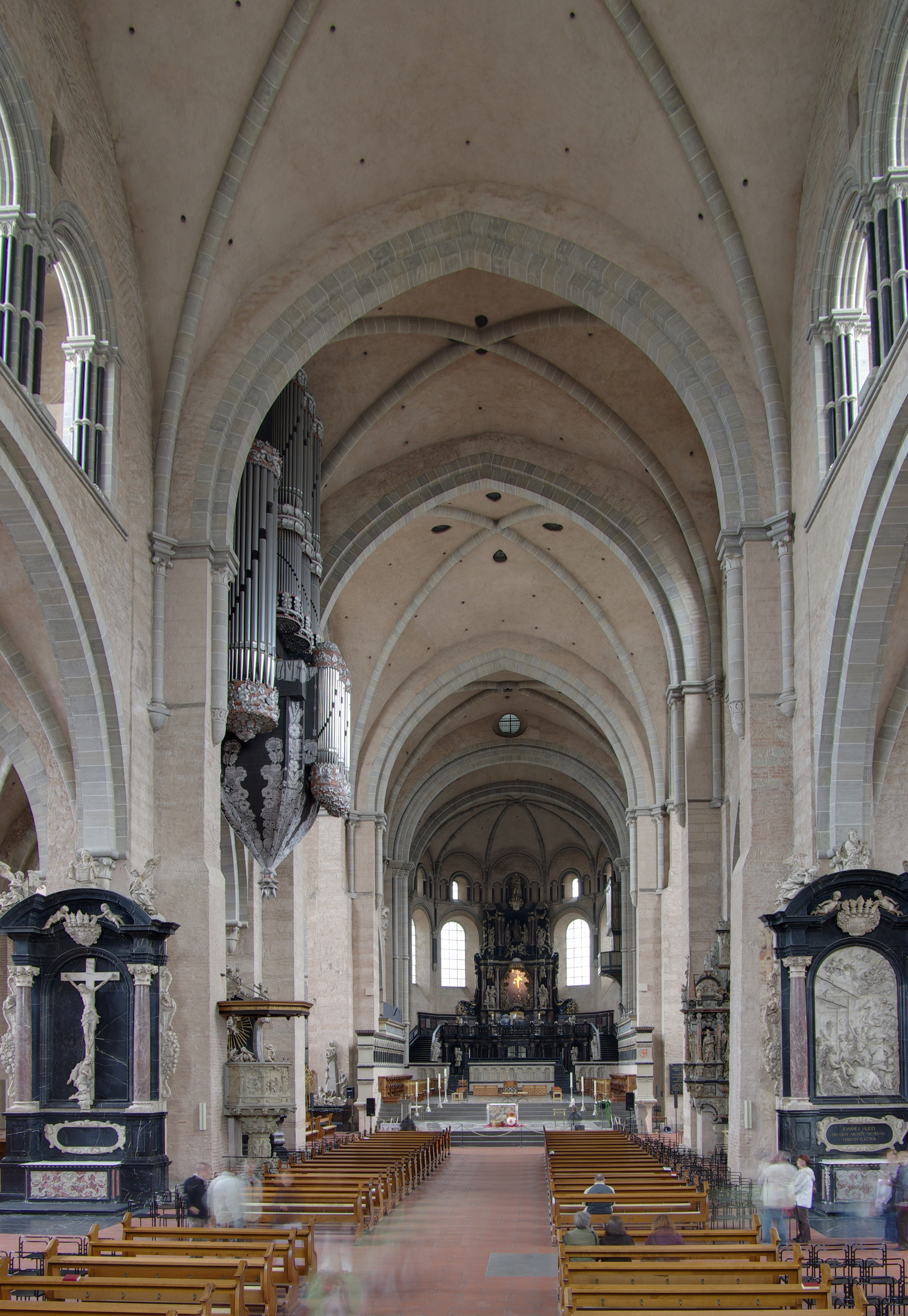 Trierer Dom, Mittelschiff, Blickrichtung nach Osten